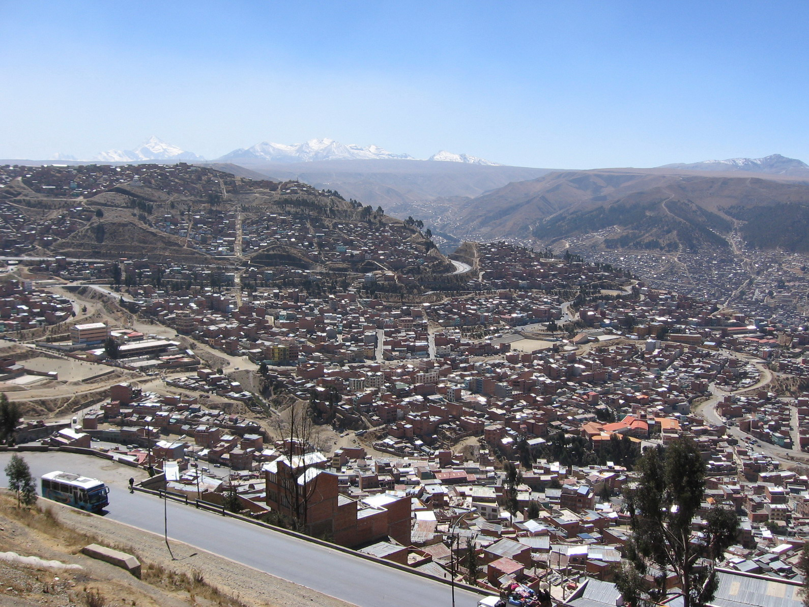 La Paz